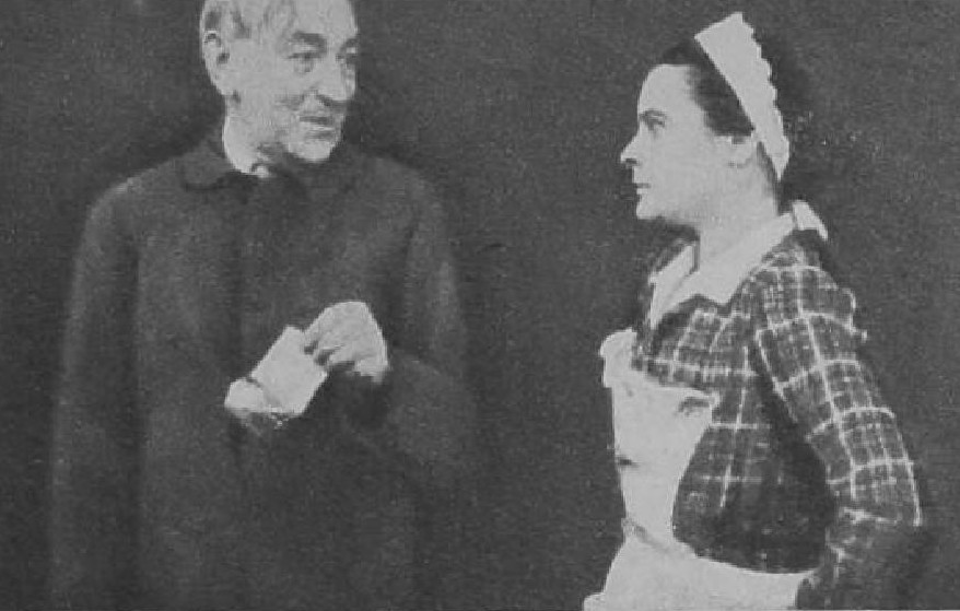 Antonín Rýdl (1885-1960), český herec a divadelní režisér